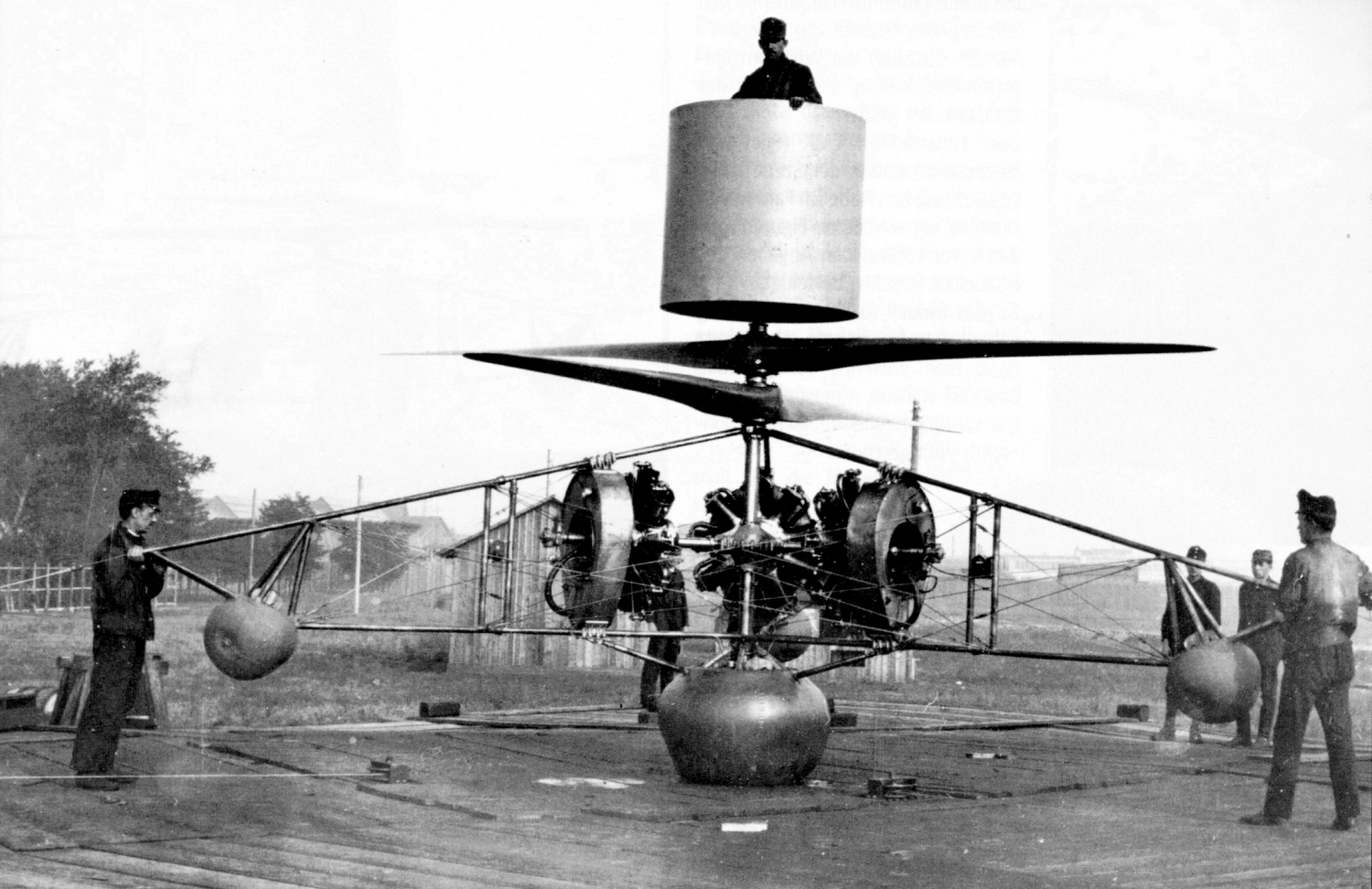 PKZ-helikopter (Tervezte: Petróczy István–Kármán Tódor–Zurovecz Vilmos) Az emelőlégcsavar megtervezését és kivitelezését Asbóth Oszkár végezte